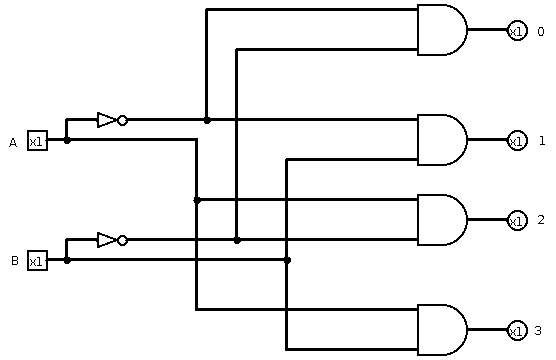 یک دیکودر دو به چهار که با برنامه logisim رسم شده است.